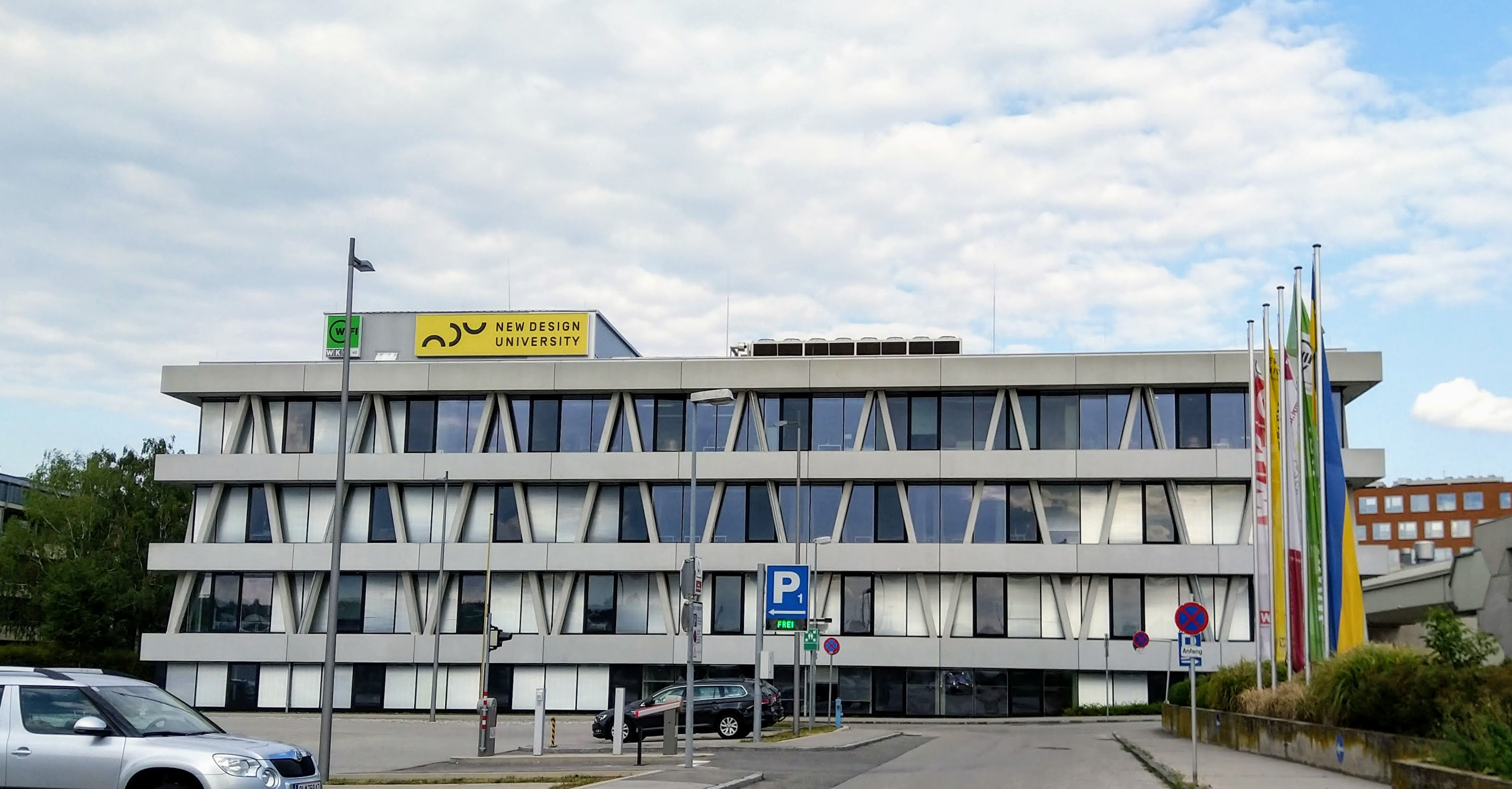 New Design University 'New Design University' (Q1448536)